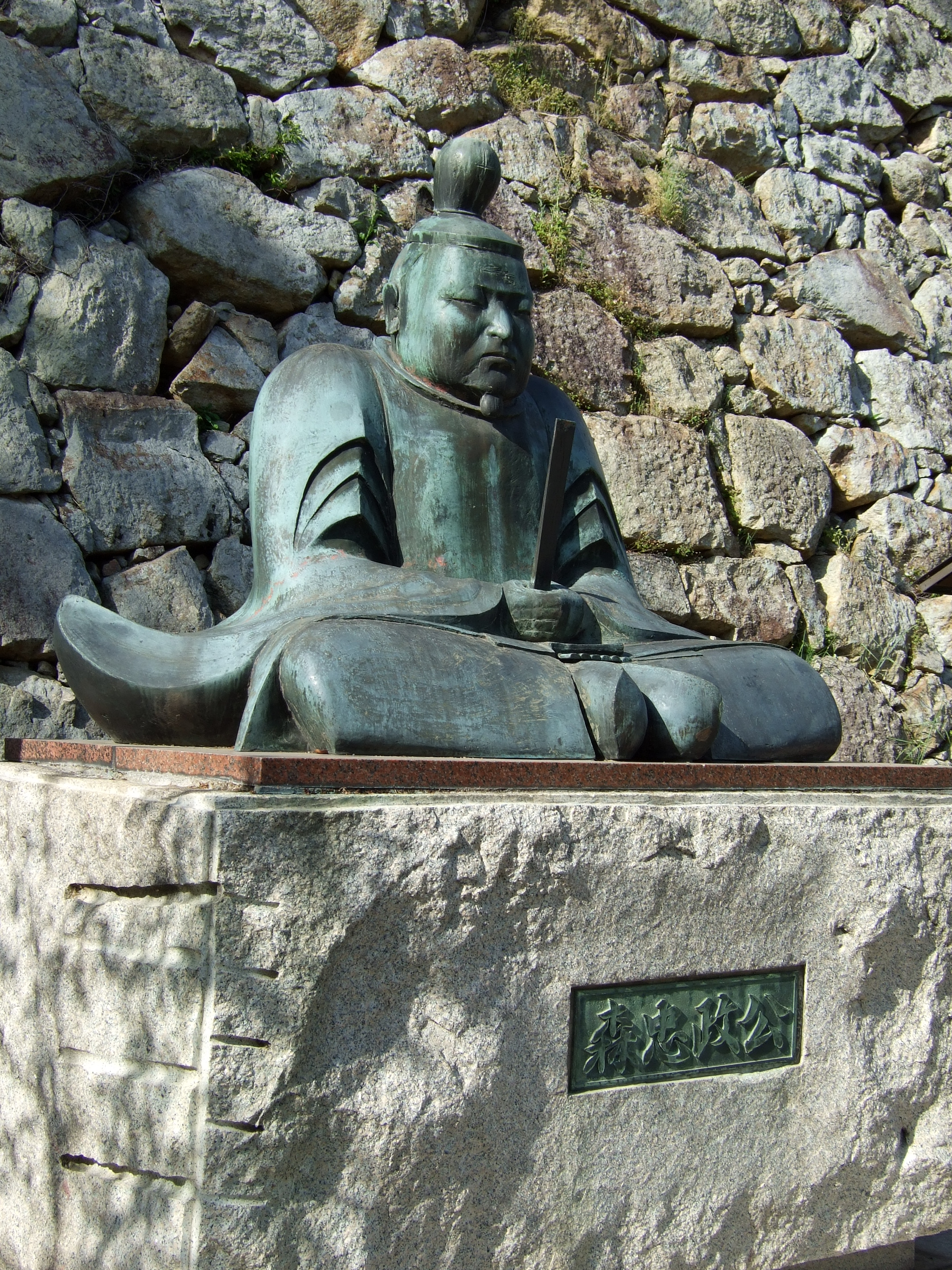 津山市山下 鶴山公園